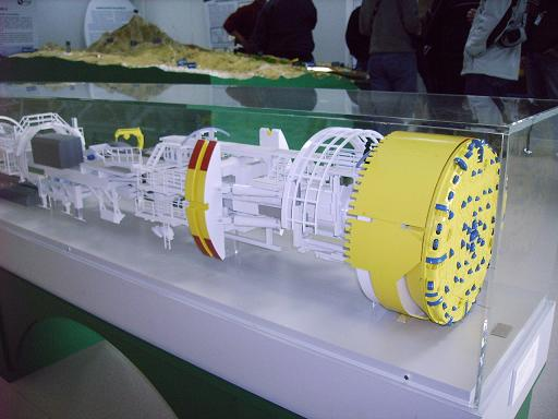 Maqueta de una de las tnueladoras usadas en los Túneles de San Pedro